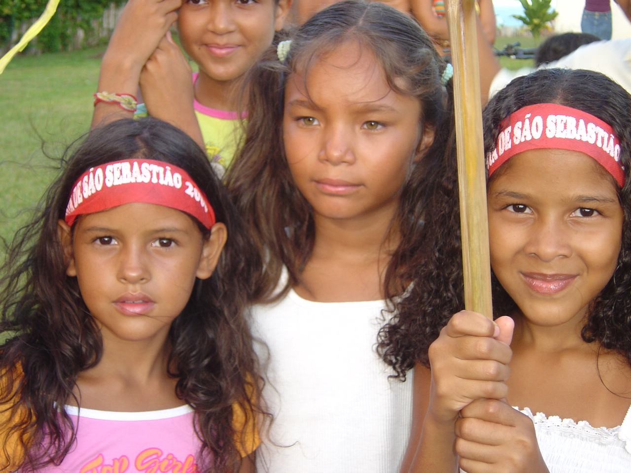 Trancoso (Bahia, Brasil): crianças nativas no dia da festa de São Sebastião.